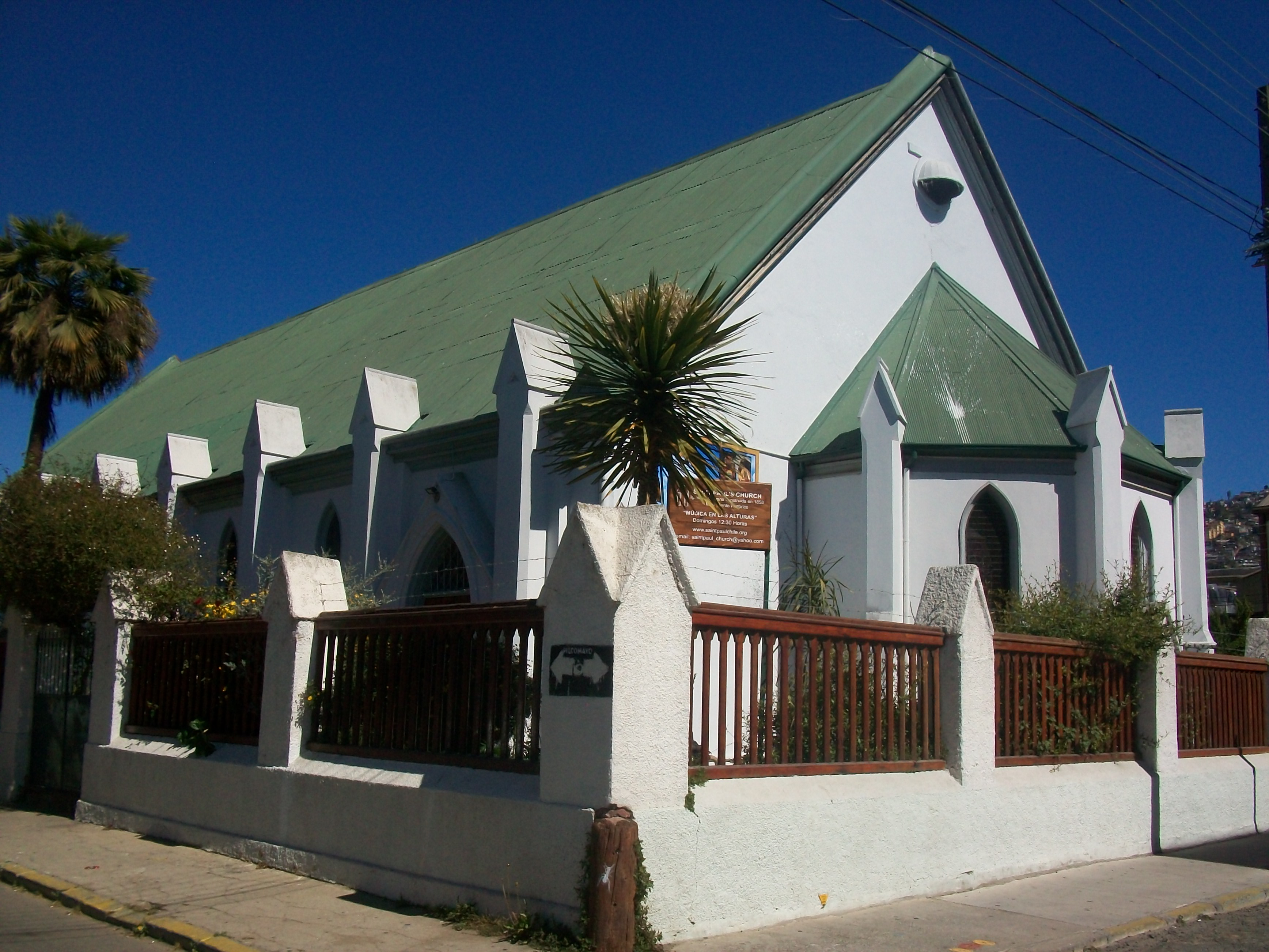 Cerros Alegre y Concepción This is a photo of a national monument in Chile: 606